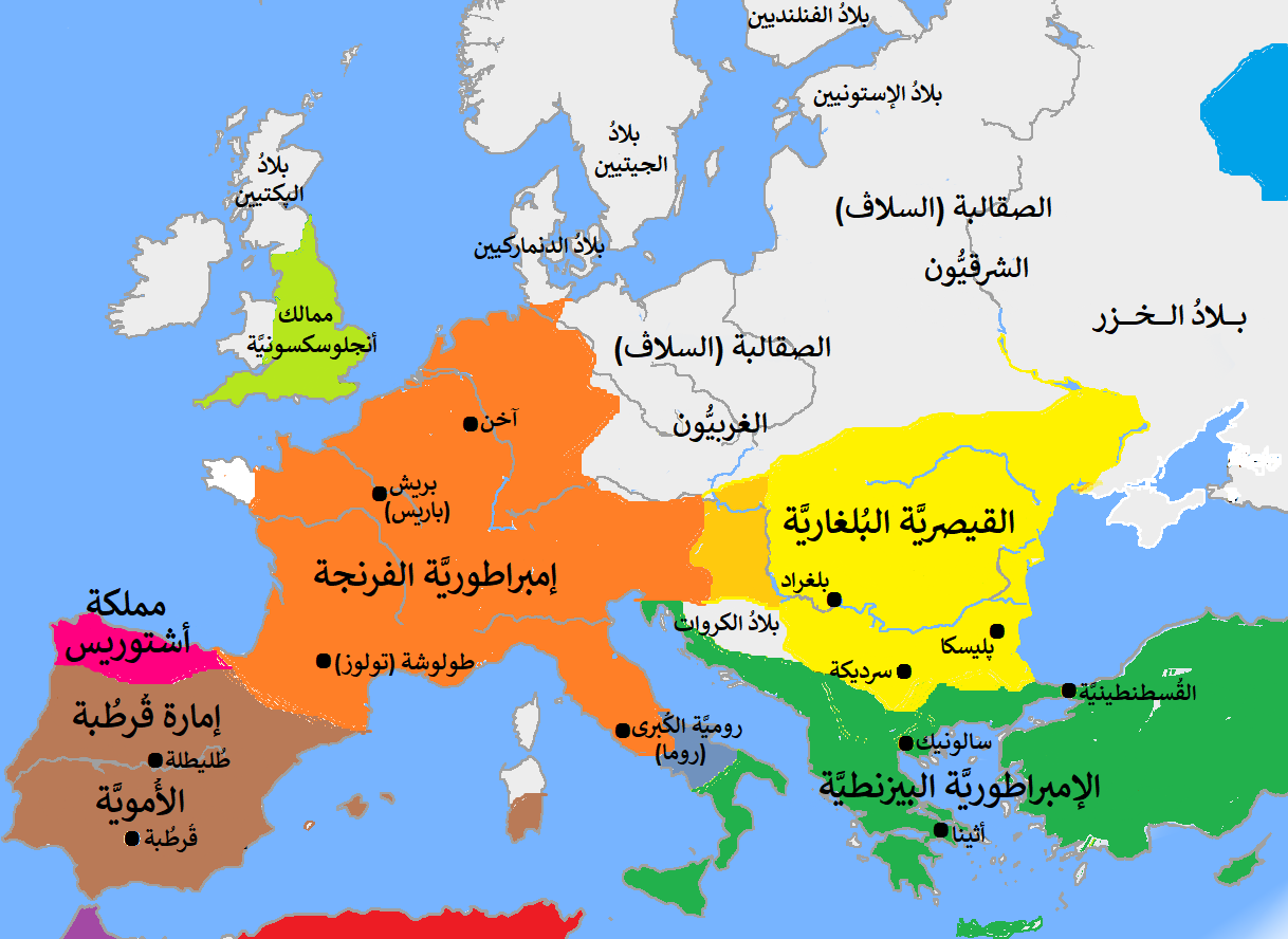 خريطة أوروبَّا في سنة 814م.